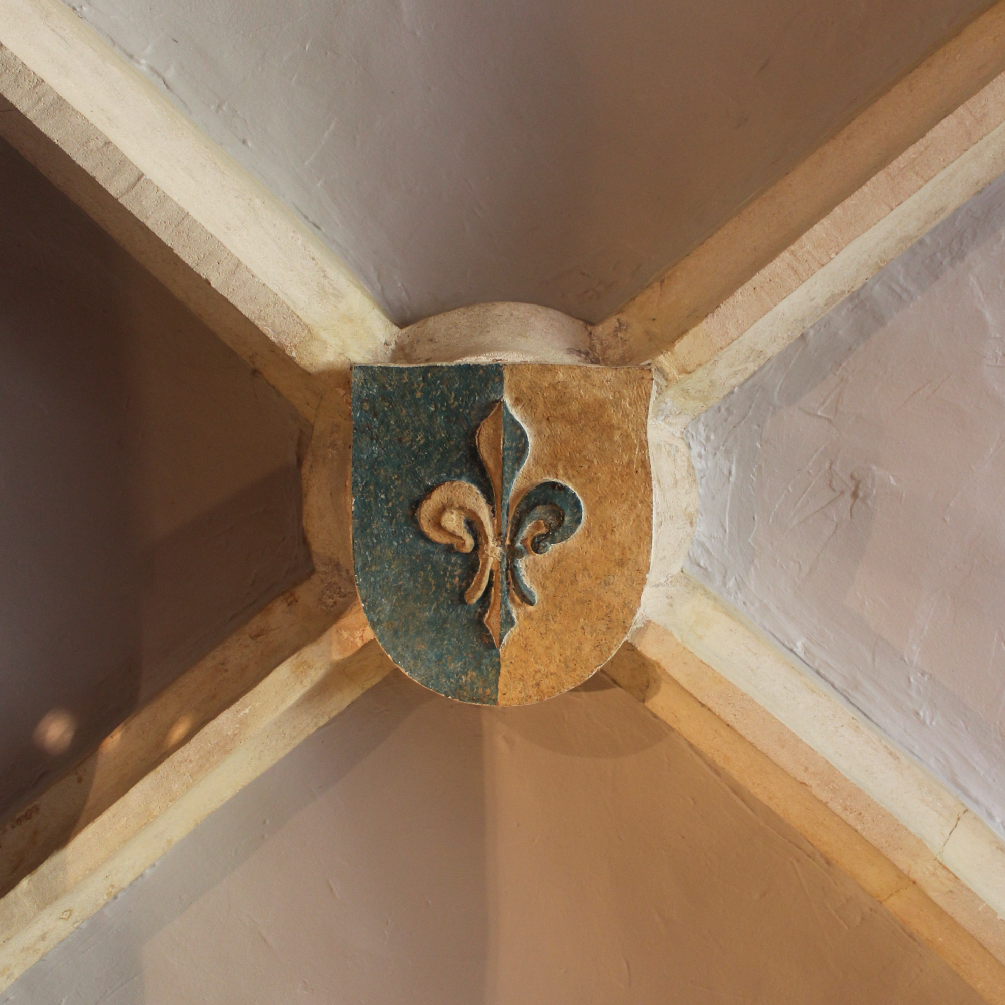 Wope vun der Famill Höcklin von Steinach, um Schlussstee vum Gewëllef am Haus Höcklin von Steinach, um Fëschmaart, Stad Lëtzebuerg.